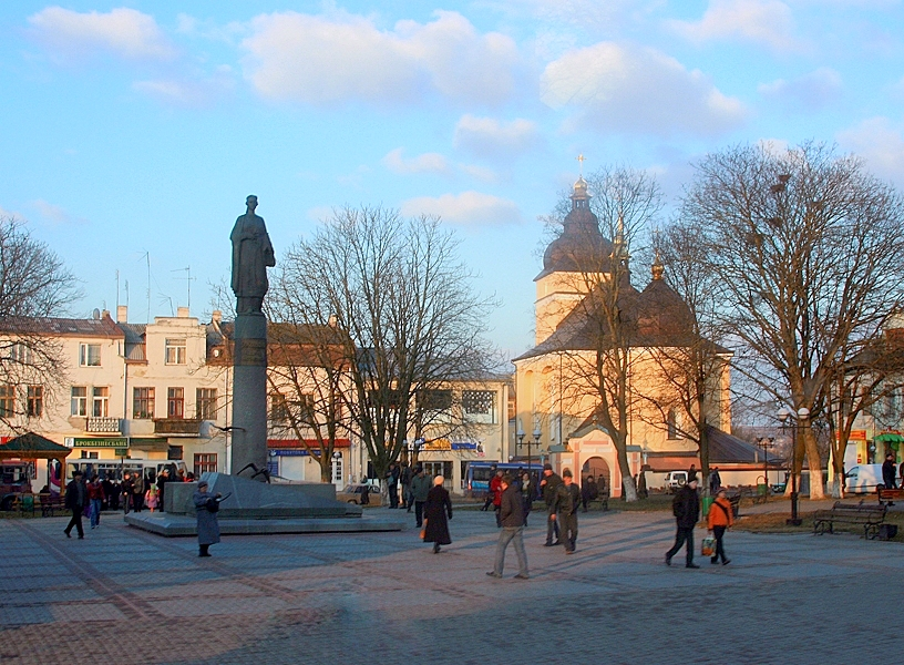 Площа у місті Рогатин, пам'ятник Роксолані